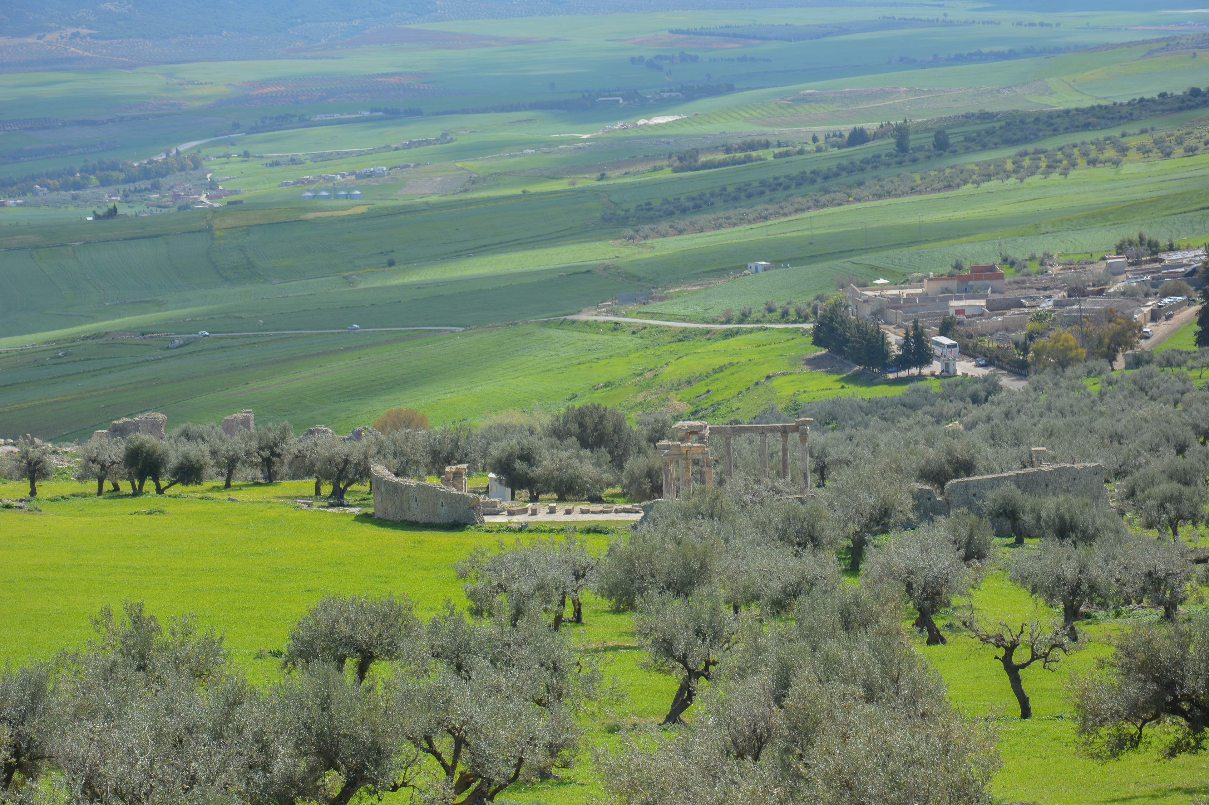 Temple de Caelestis